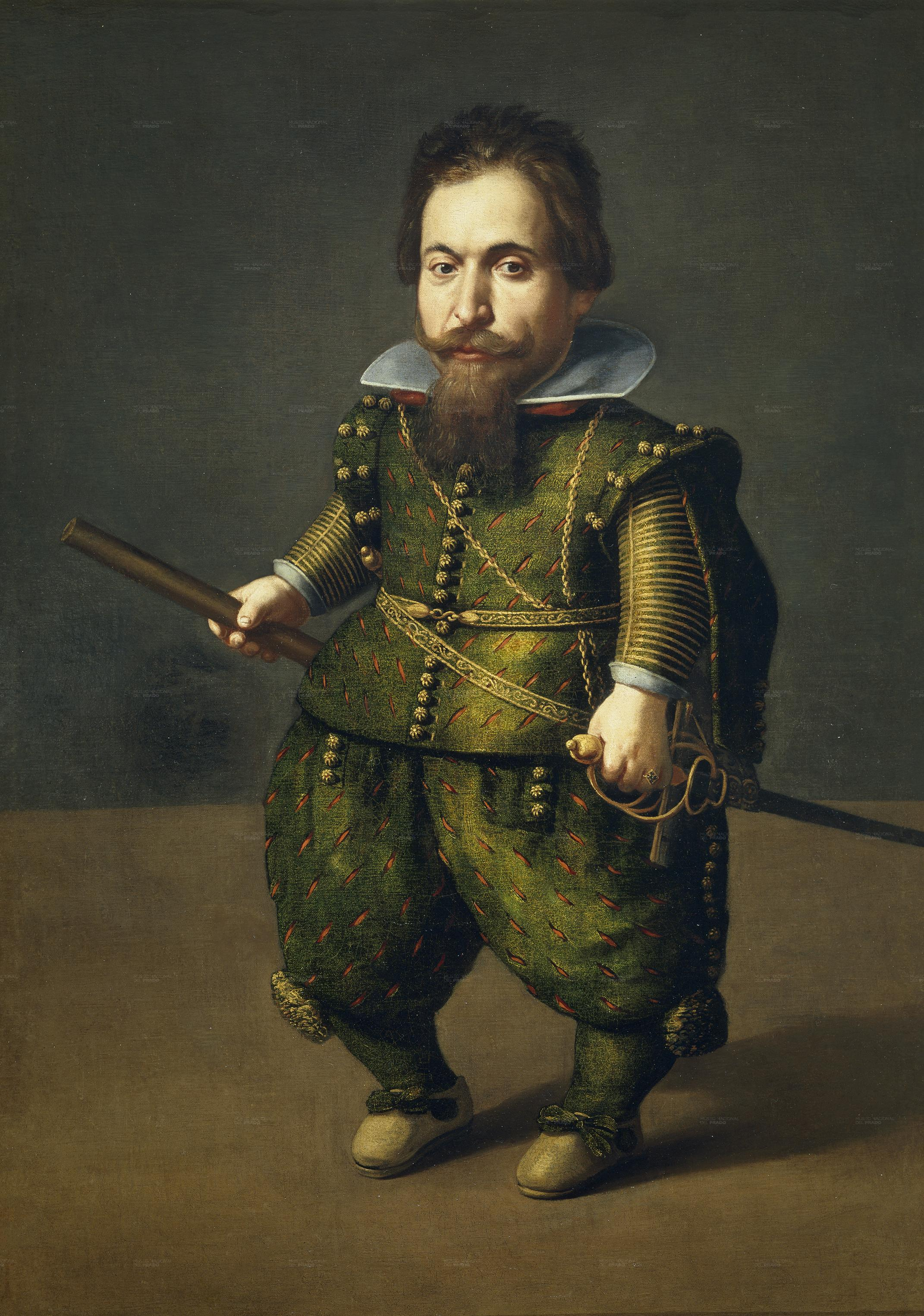 En el inventario del Marqués Leganés se le nombra como retrato del “enano del conde de Olivares”, denominación que posiblemente se debía al parecido con el valido del rey. El cuadro formaba parte de una serie de ocho retratos de bufones muy conocidos de la Corte (al menos dos de ellos pintados por Velázquez, según el inventario) que se ubicaban en la casa de campo que el marqués tenía en Leganés. Se trata de un retrato de una factura extraordinaria en el que destaca el delicado detallismo con el que está tratado el terno y especialmente la fuerza expresiva del retratado.